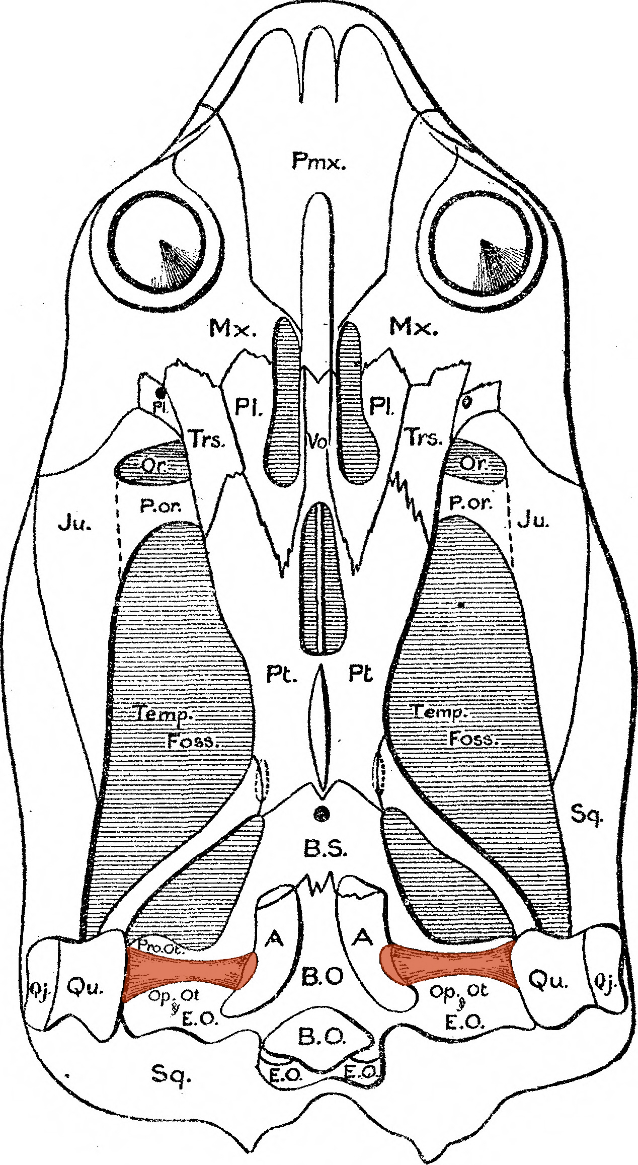 Undersiden av hodeskallen til en Dicynodon, viser søylebeina i rødt.